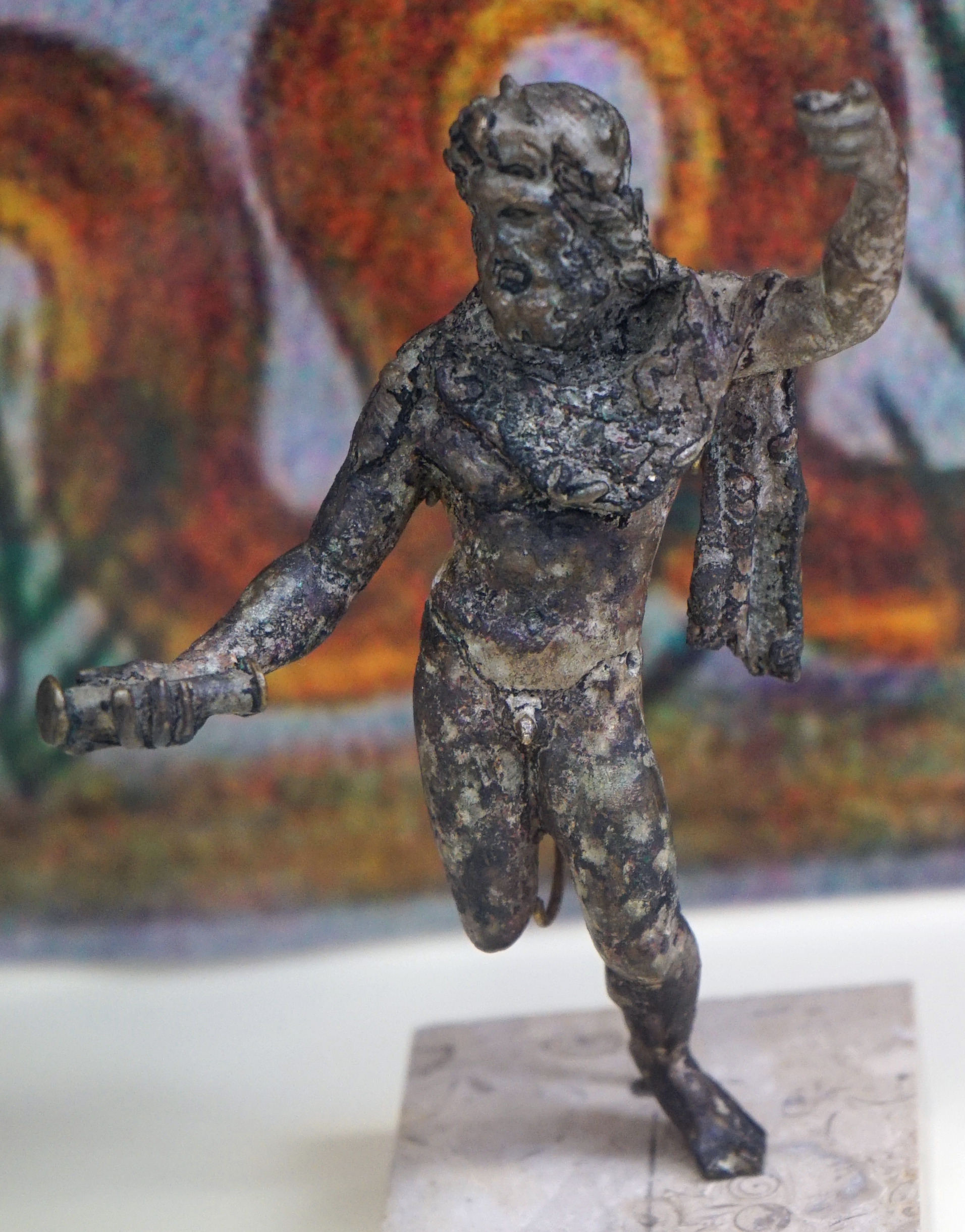 vitrine sur la religion romaine.